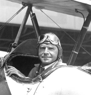 Fred Burnham's eldest son: Roderick.